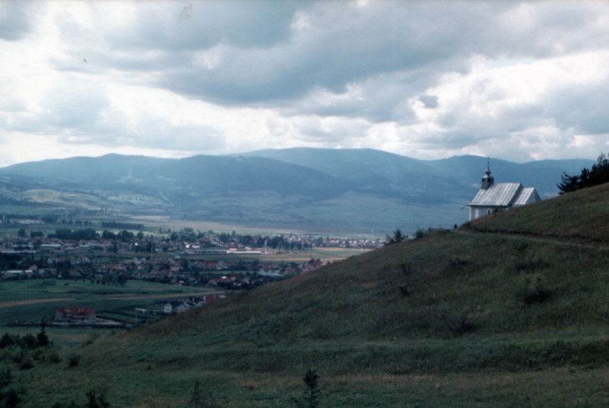 Kilátás a csíksomlyói Szent Antal-kápolnára